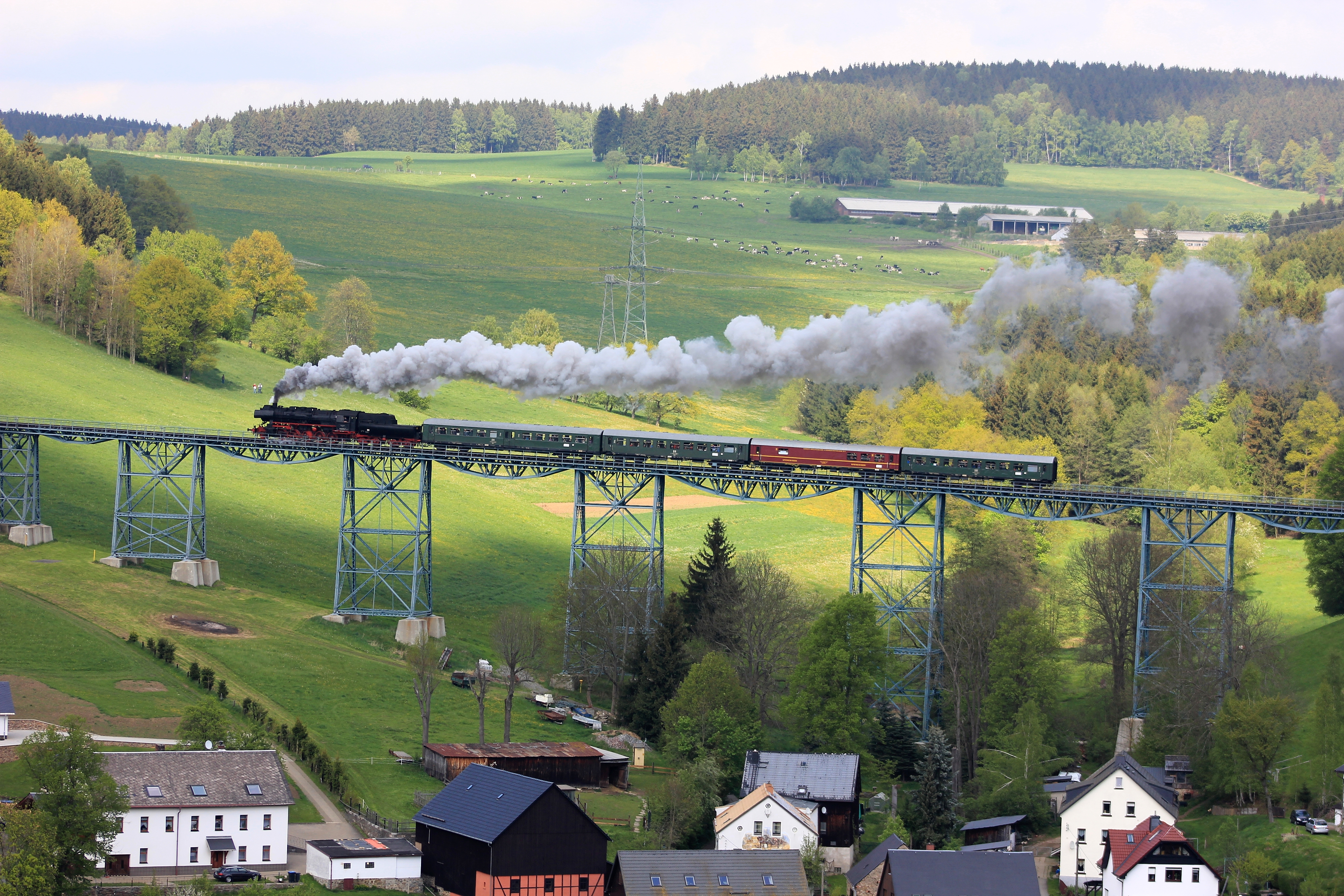 Dampflokomotive. Markersbacher Viadukt in Markersbach. Erzgebirgskreis. Sachsen. Deutschland.